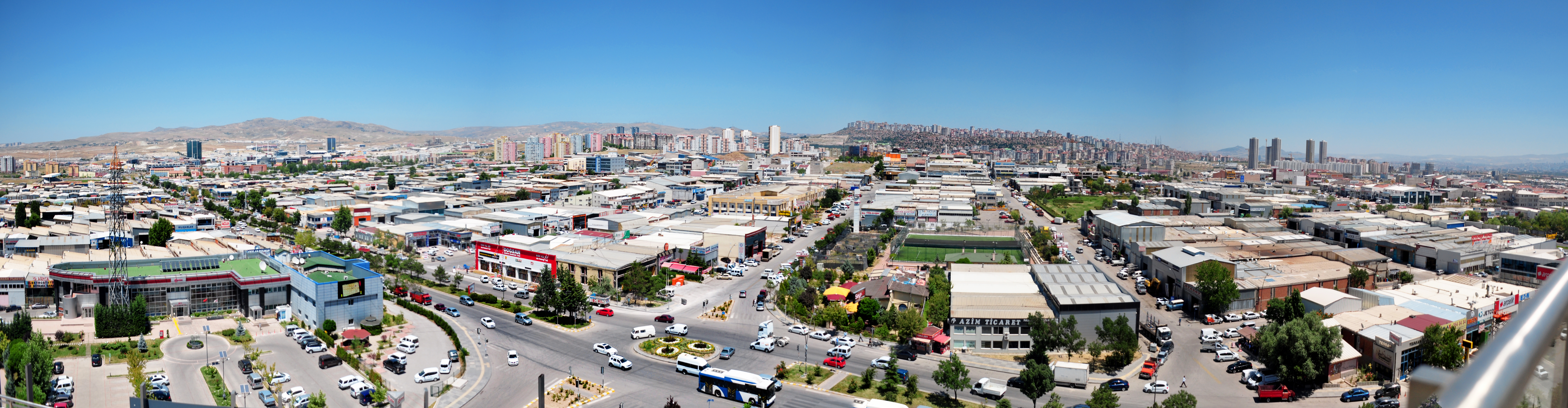 OSTİM, başkent Ankara’da, 5 milyon metrekarede, 17 ana sektörde, 139 iş kolunda, onbinlerce farklı ürün, 5 bin 200 işletme, 60 bin çalışanıyla bir sanayi kentidir.